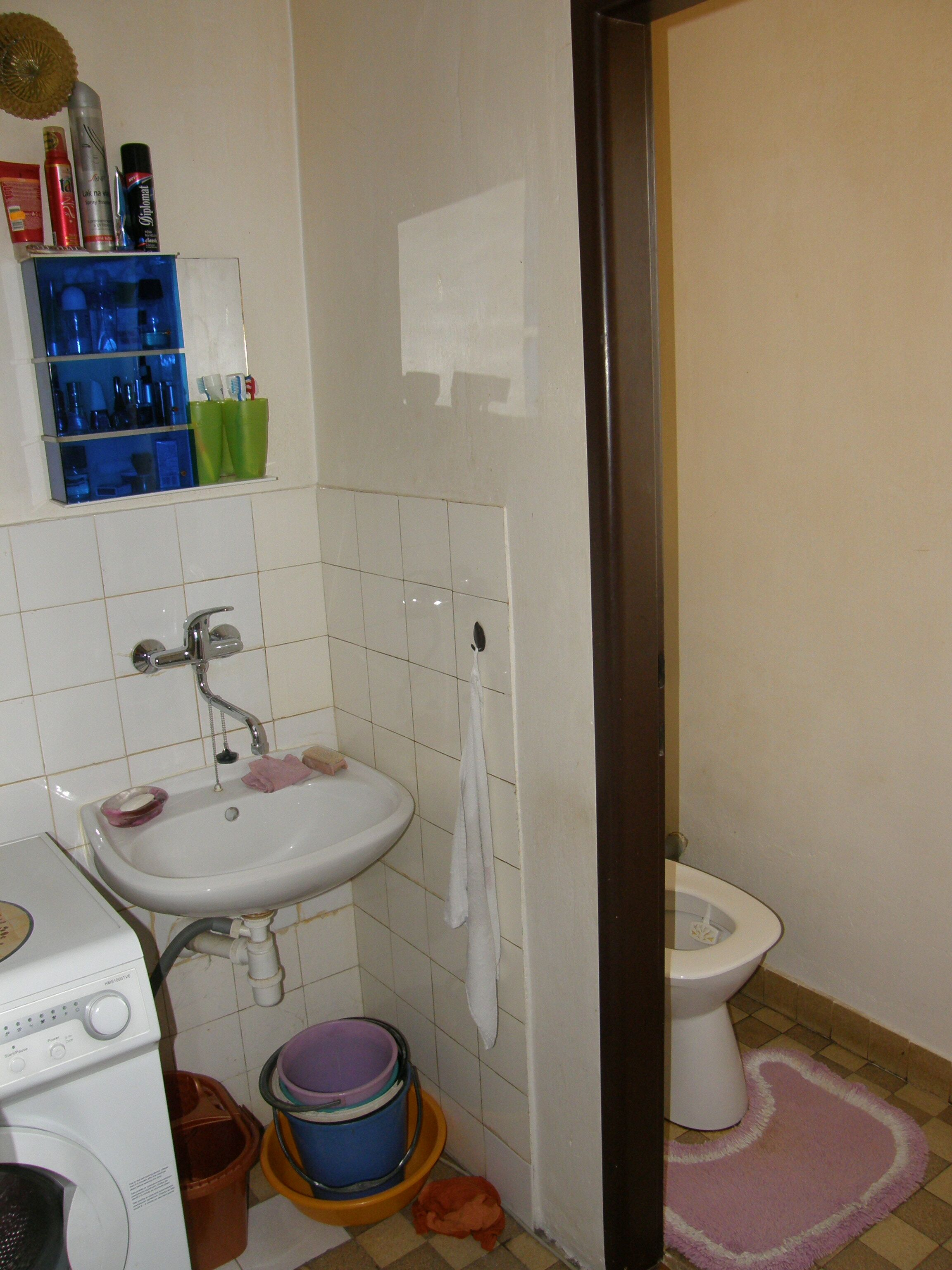 Příčka dělící záchod od koupelny